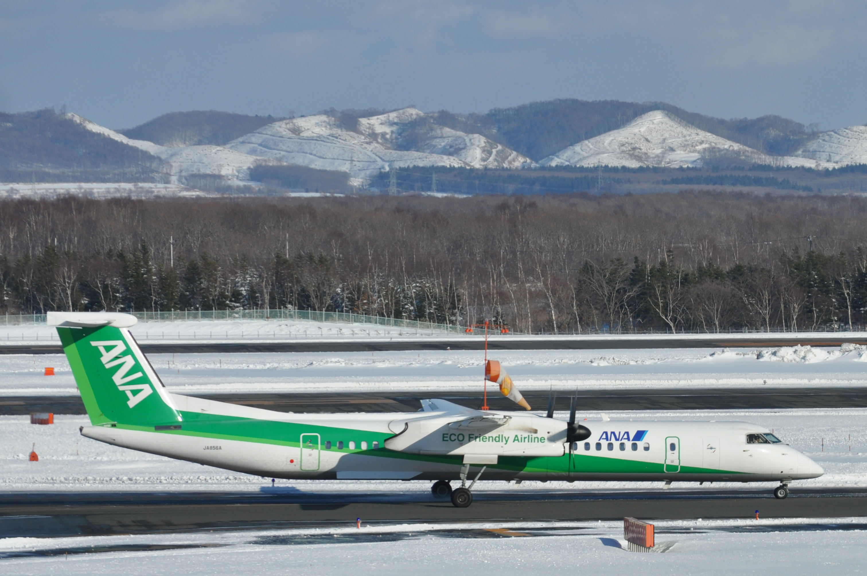 ANAウイングスの「エコボン」。新千歳空港(CTS/RJCC)にて